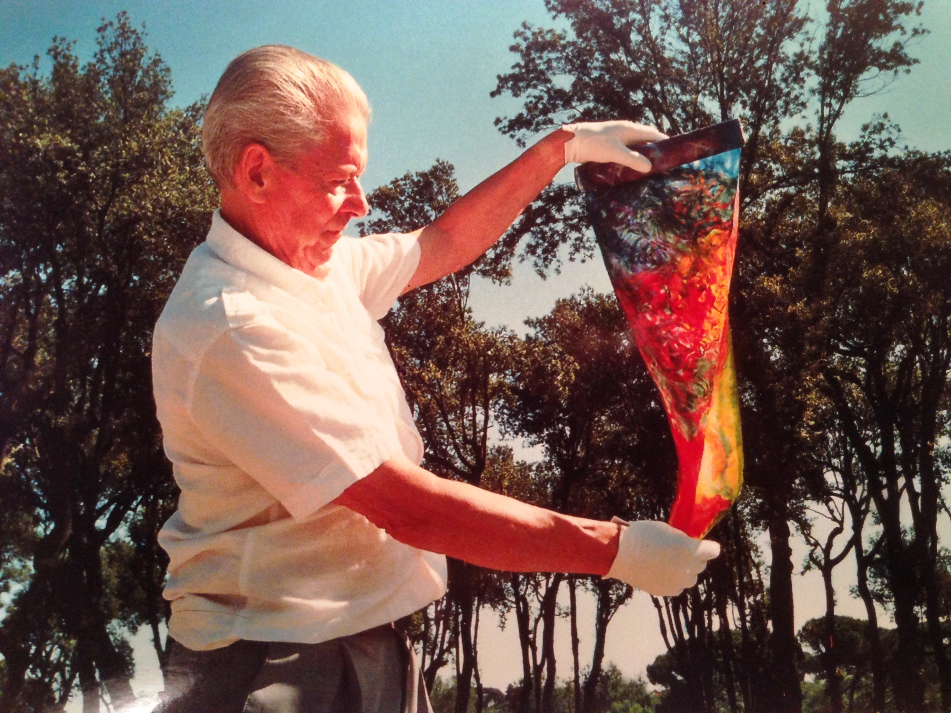 Michel HAUMANT à Rome à l'été 2012 (villa Medicis)